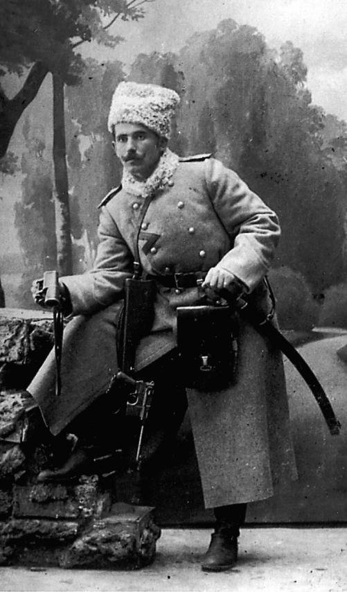 Беларуская (тарашкевіца): Станіслаў Булак-Балаховіч, жаўнер аддзелу Пуніна